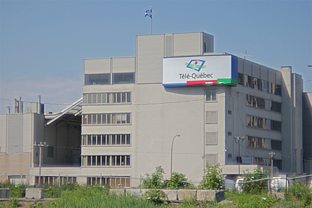 Édifice de Télé-Québec, 1000, rue Fullum, Montréal Siège social de Télé-Québec vue de l'avenue De Lorimier